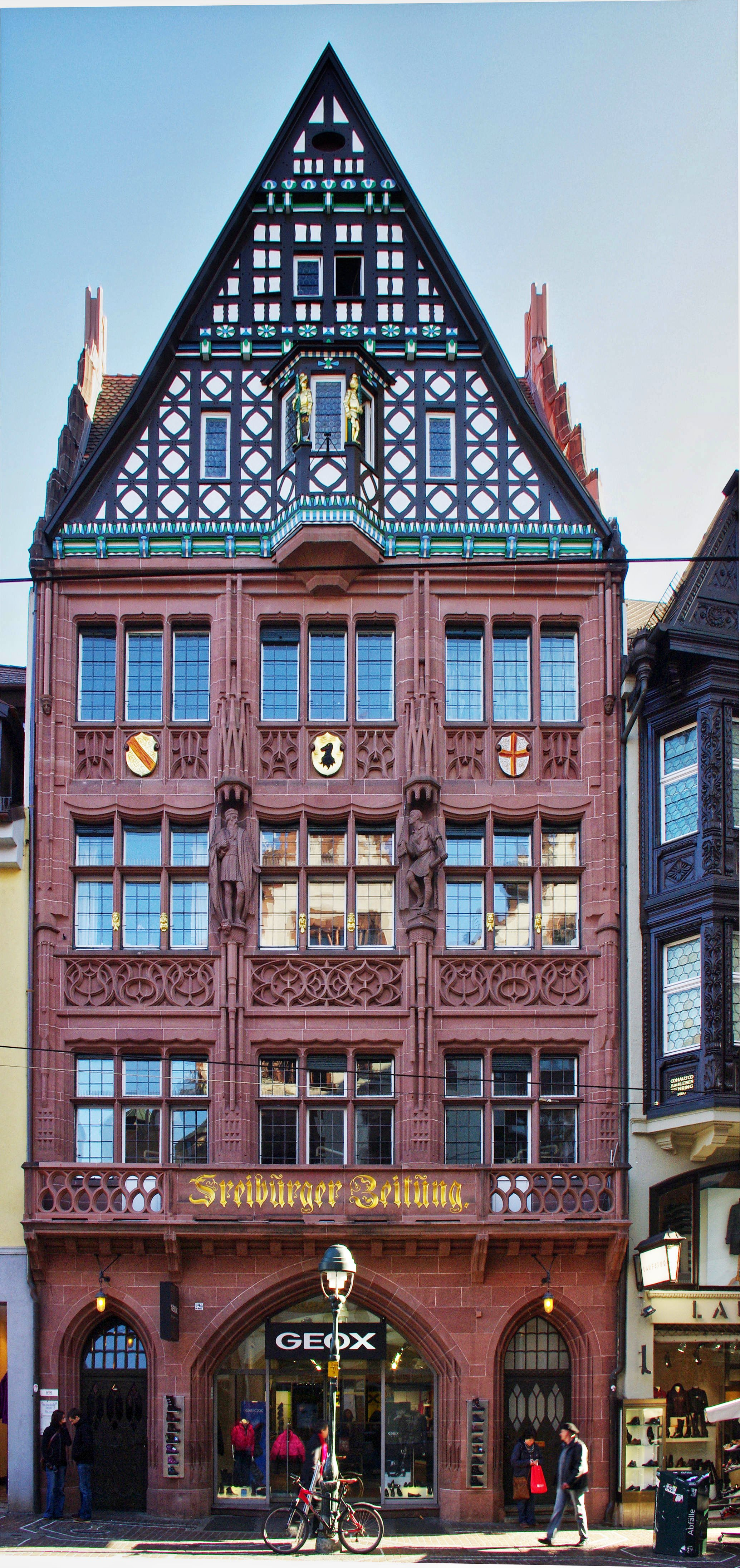 Das alte Haus der Freiburger Zeitung